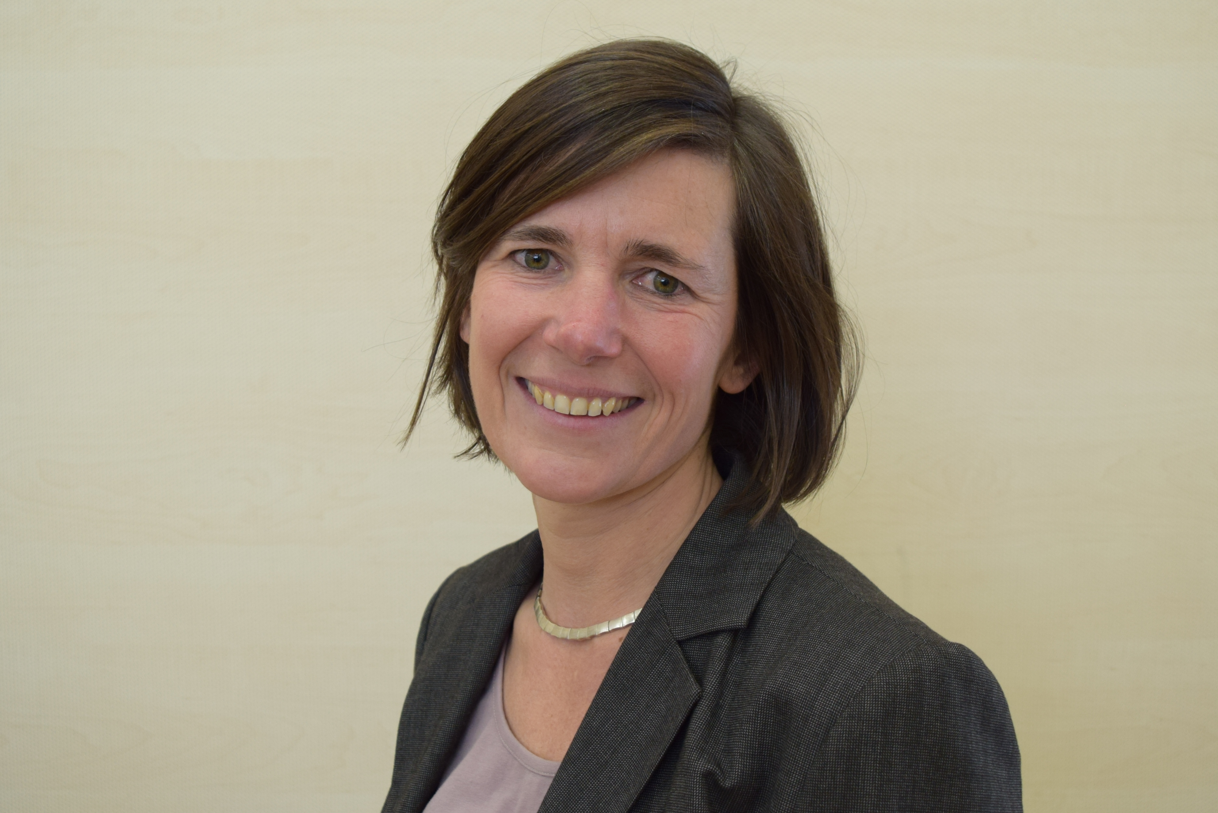 Christel Sprößler